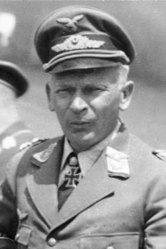 Generalfeldmarschall Wolfram von Richthofen on East Front of WWII.